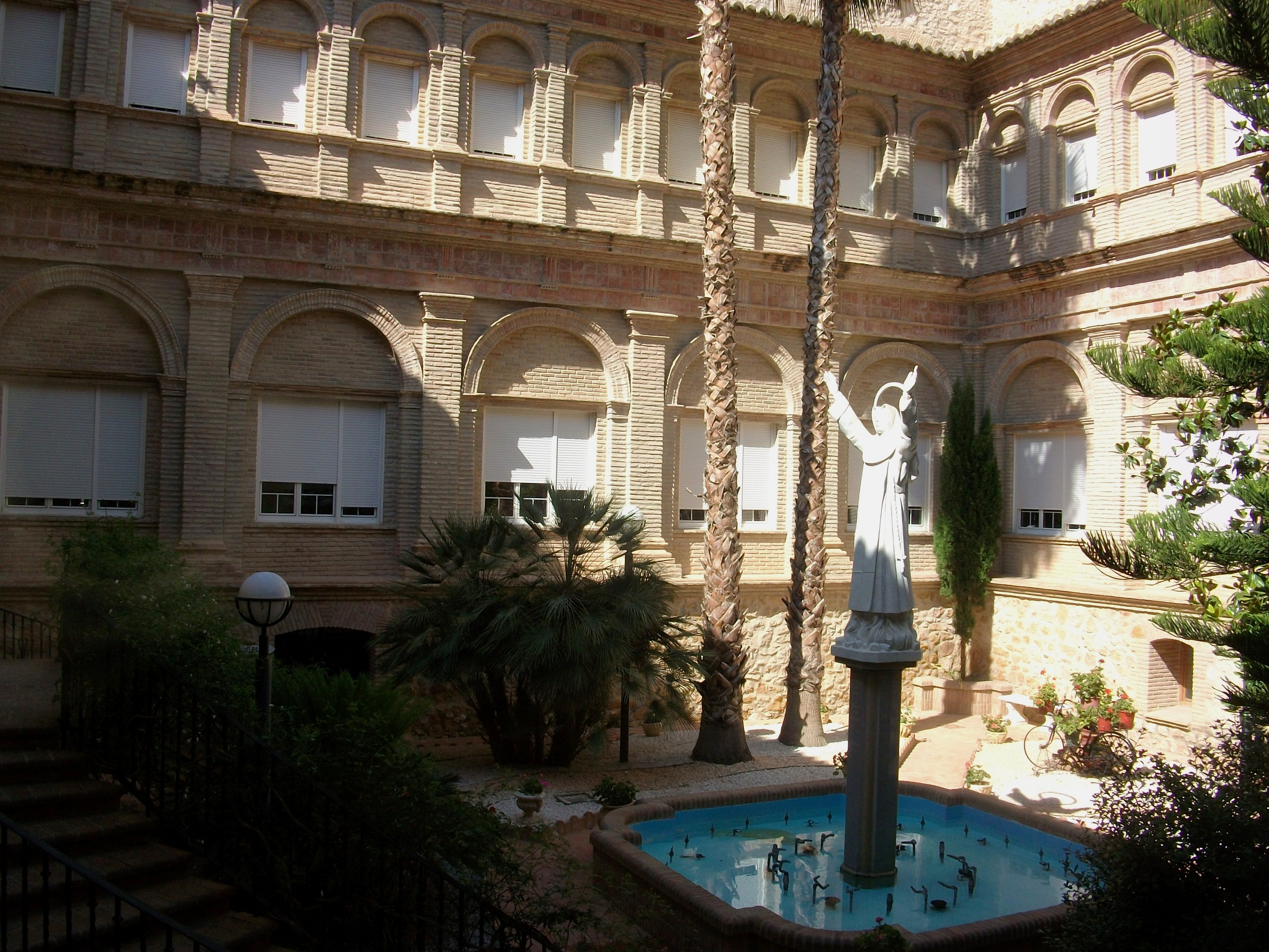 Claustre del convent del Remei, Llíria.